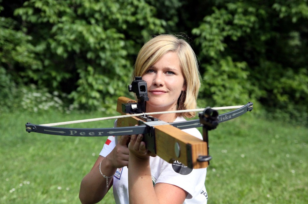 Franziska Peer mit der Armbrust